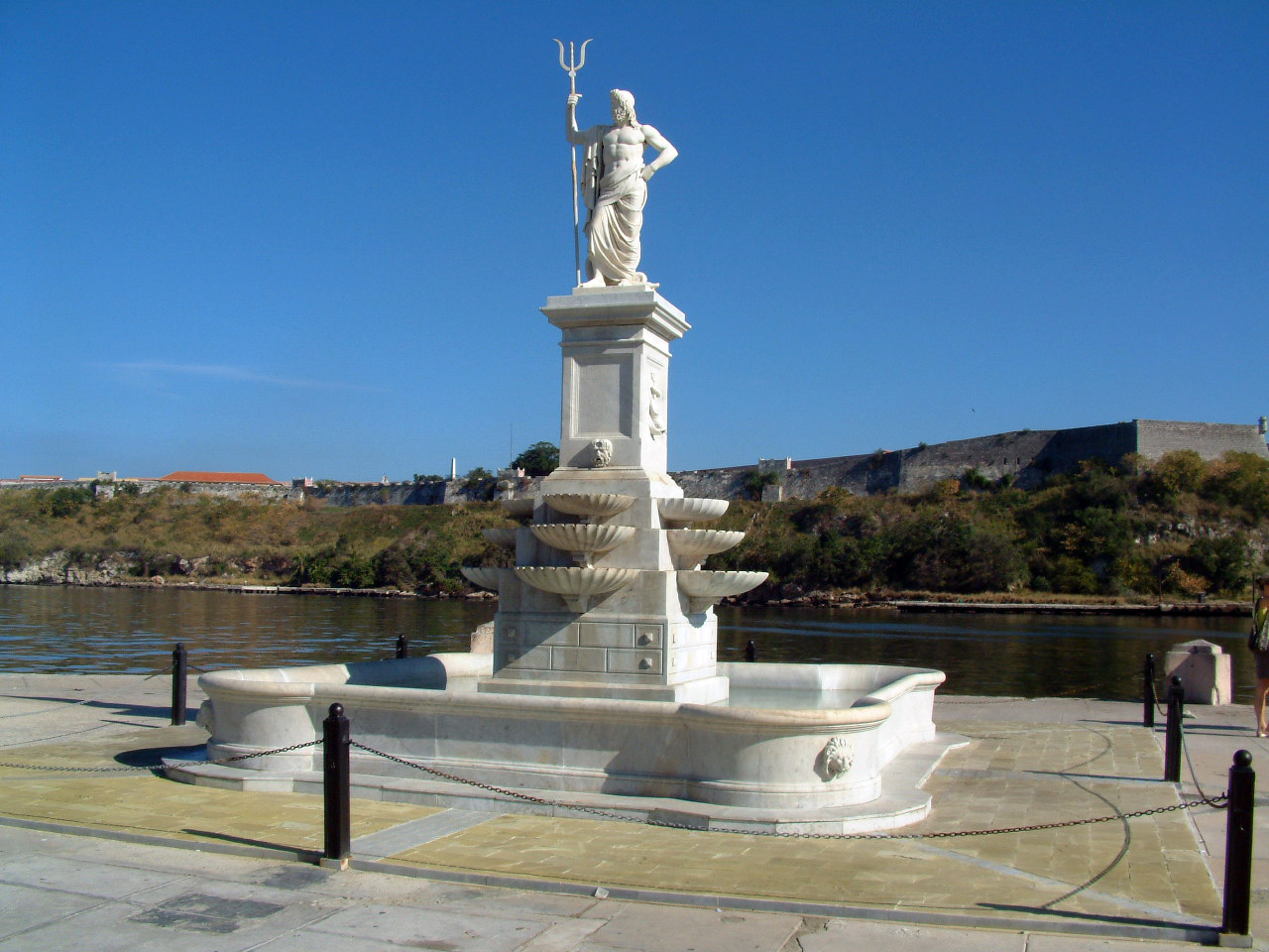 Fuente de Neptuno, la Habana.